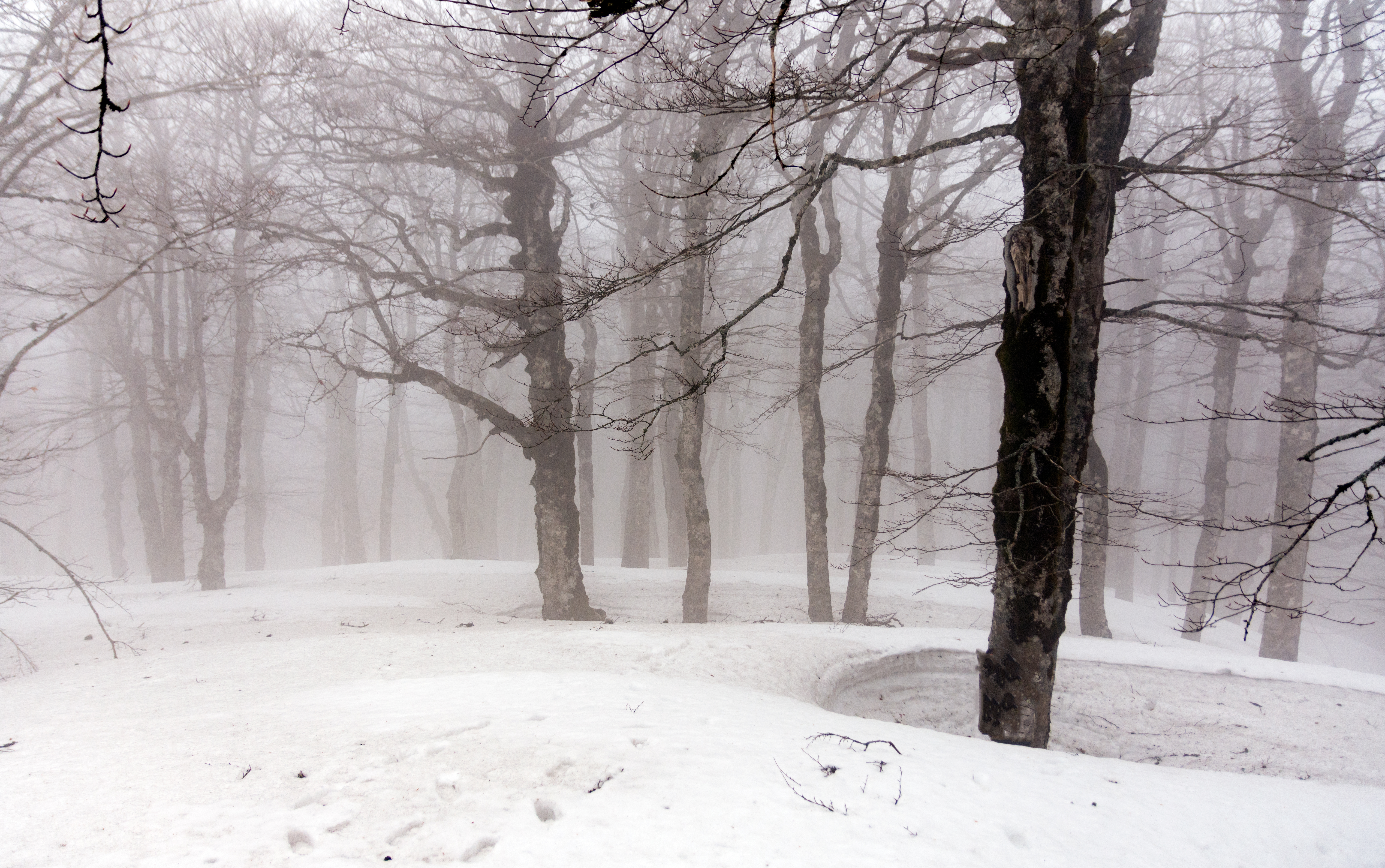 Εικόνα από το δάσος της οξυάς